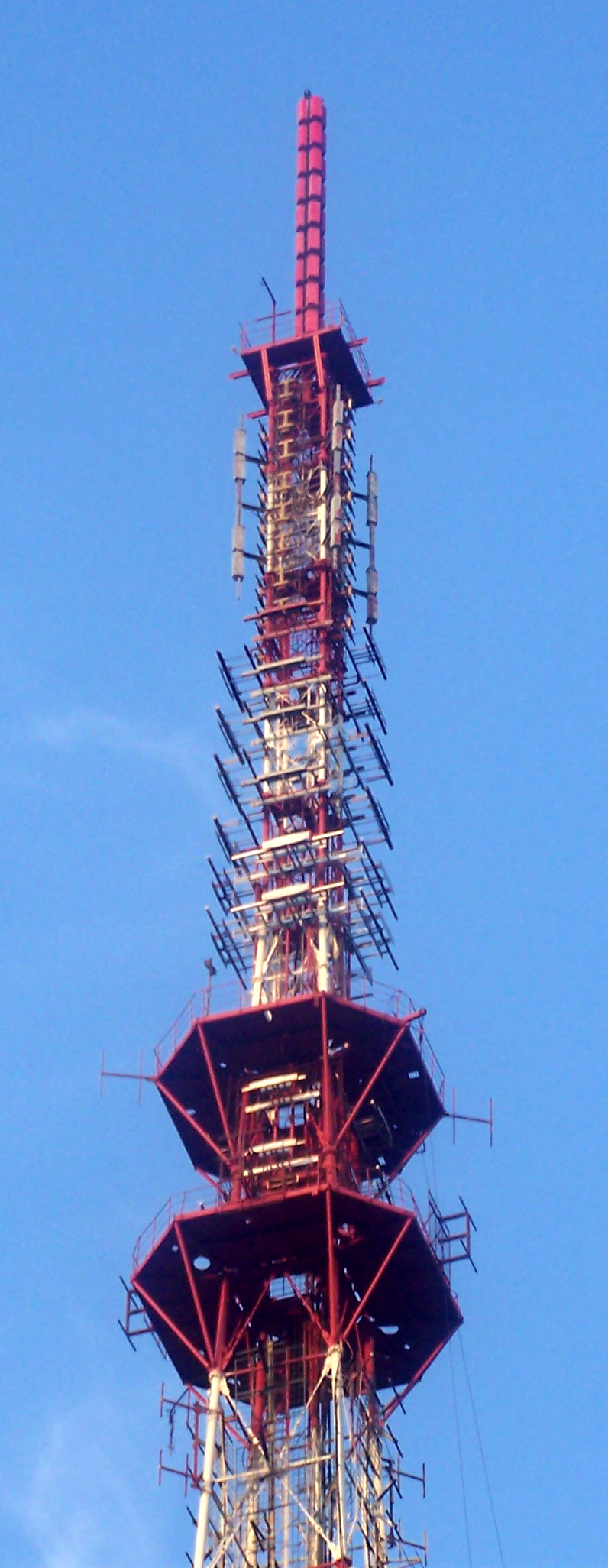 Верхняя часть телебашни РТПС «Новосибирск»